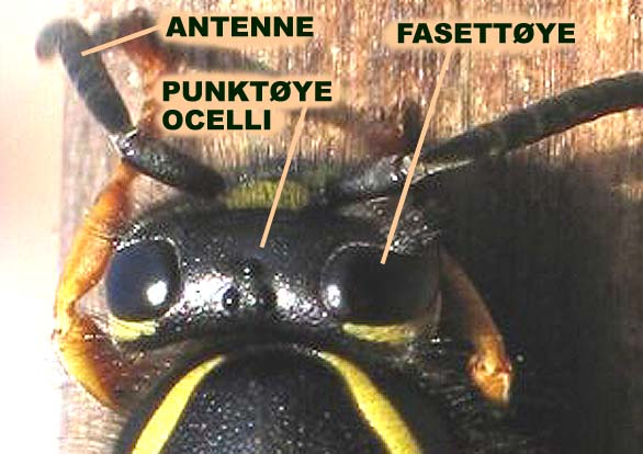 Medianøye / øye: Hode Vespula rufa (Vespidae, Hymenoptera) (Rødveps).